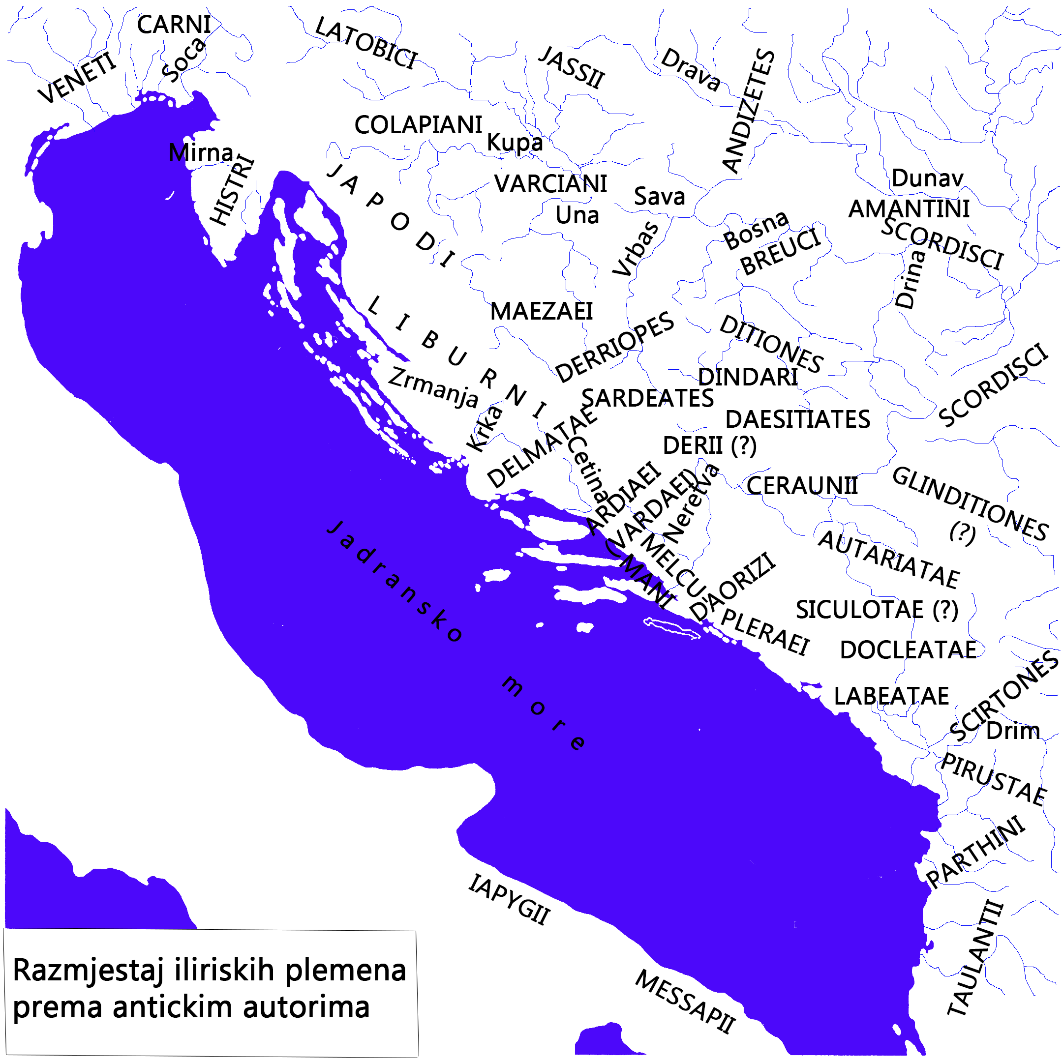 Rasprostranjenje ilirskih plemena (not sure about language) carte des tribus illyriennes illyrische Stamme Karte Mappa di tribu illiriche mapa de tribos ilirias Mapa Ilirske plemena mapa de las tribus de Illyrian Fiset ilire harte Χάρτης Ιλλυριών φυλών Карта из иллирийских племен Мапа илирског племена